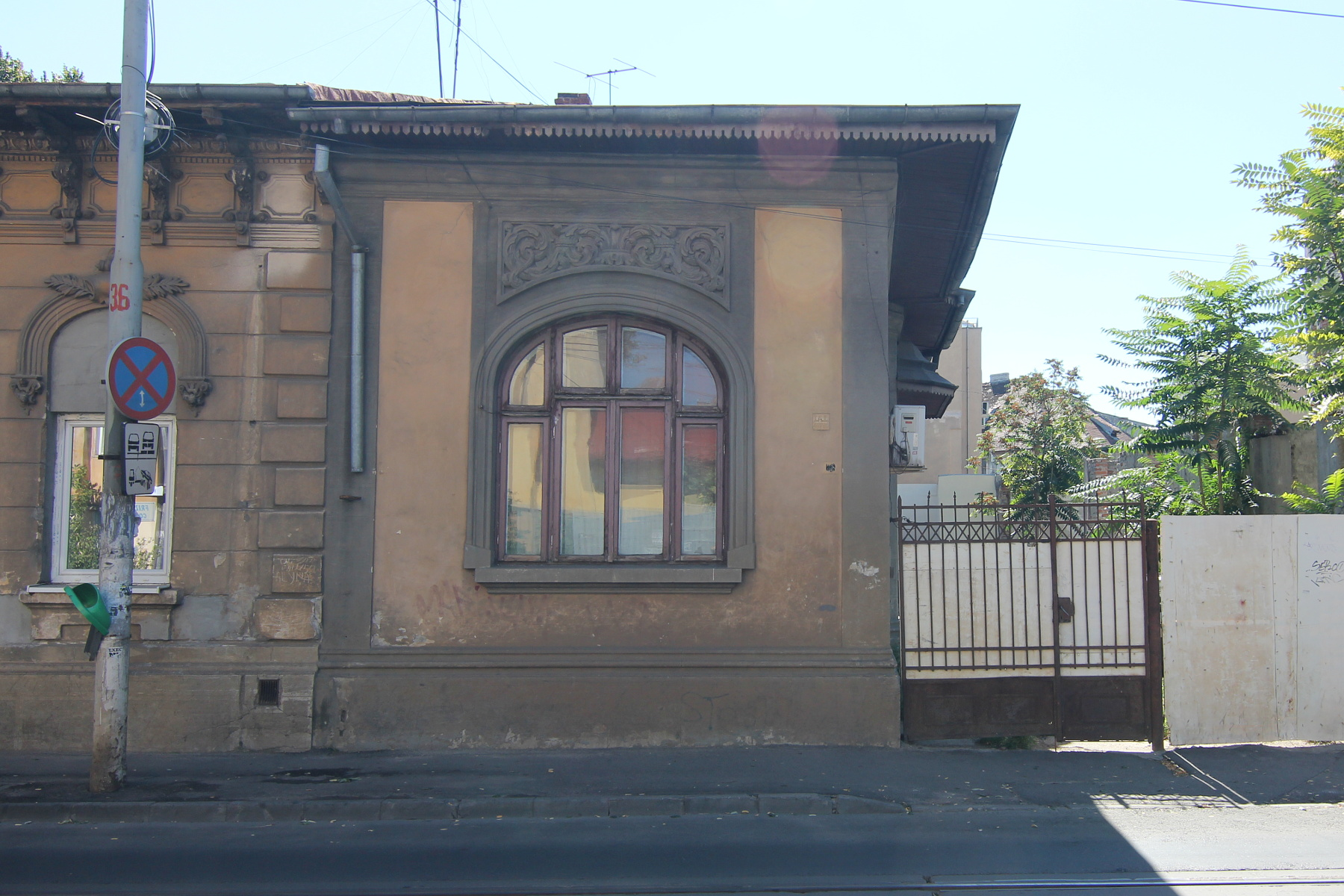 Casă pe Calea Călărașilor